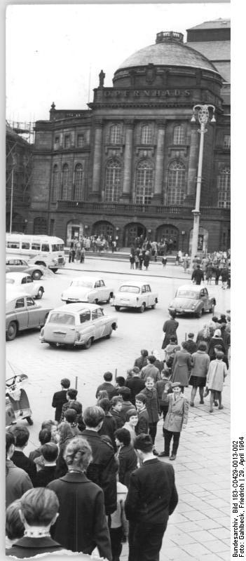 Chemnitz, Opernhaus Zentralbild Gahlbeck 29.4.1964 Jugendvorstellung im Opernhaus von Karl-Marx-Stadt.